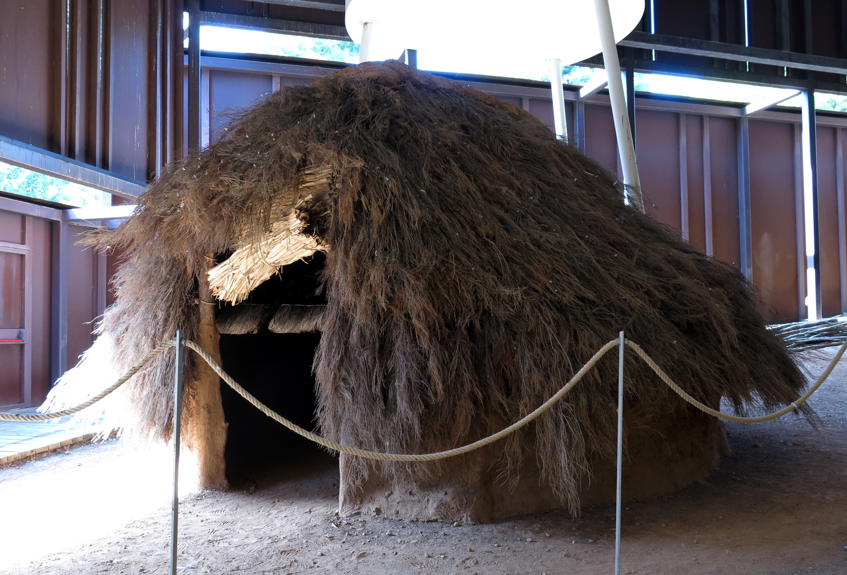 Parc arqueològic de les Mines de Gavà